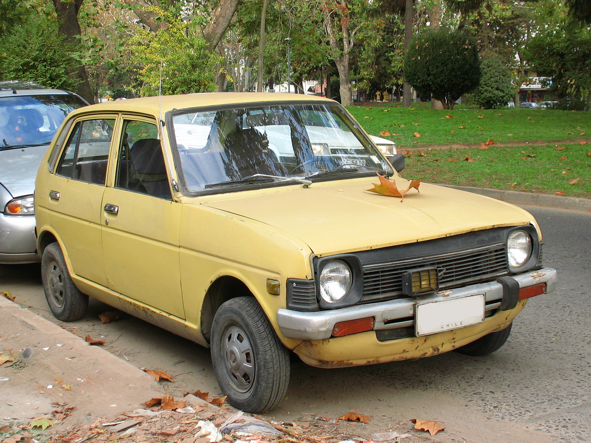 Daihatsu Max Cuore 550 1980